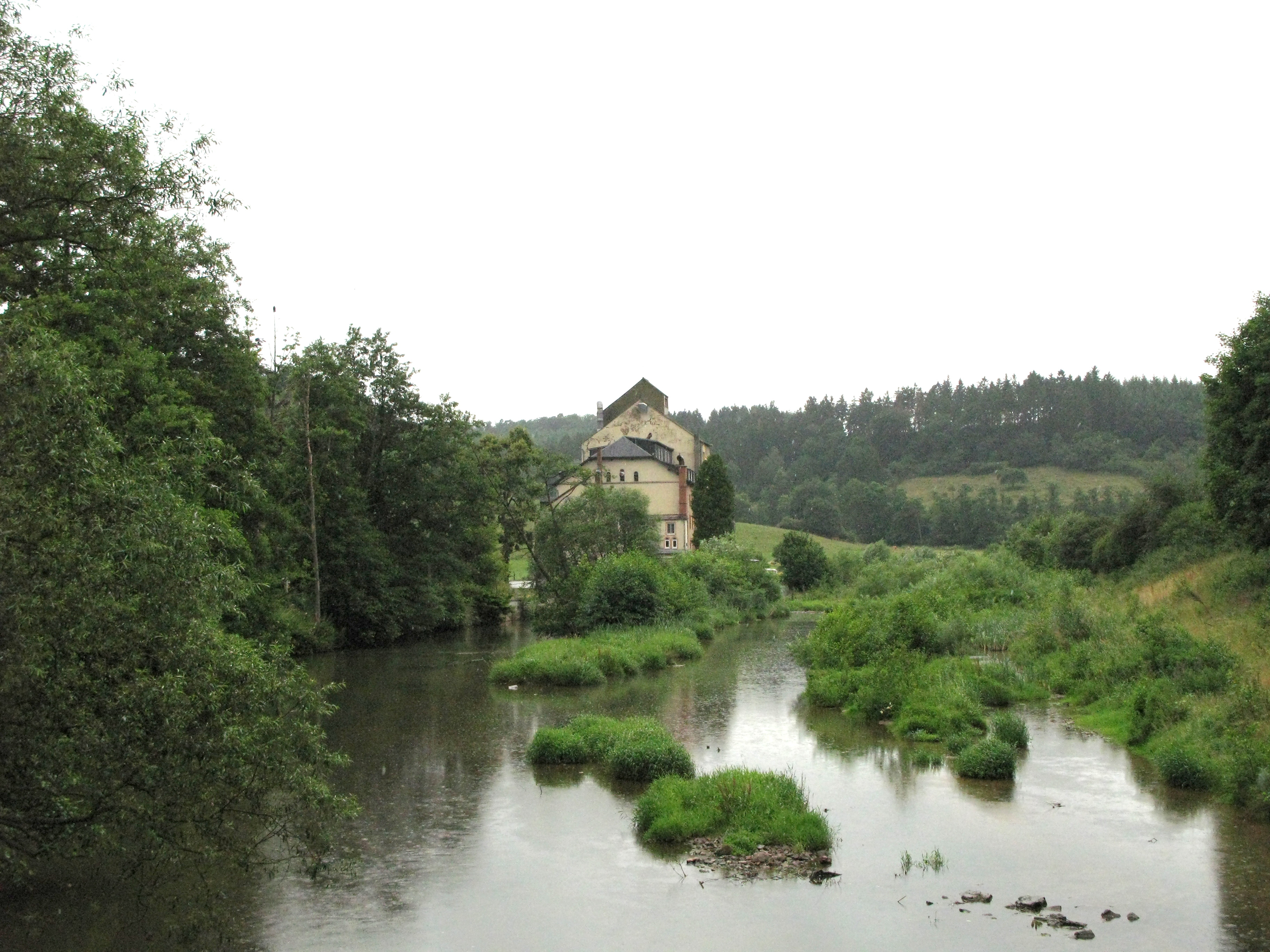 D'Bisser Millen, d'Atert an de Milleweier.